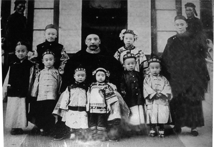 中文（中国大陆）: 袁世凯与自己的孩子们